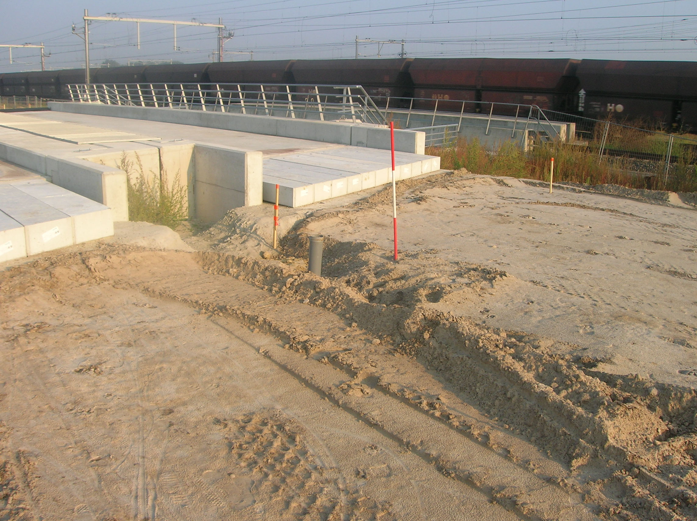 Stootplaat